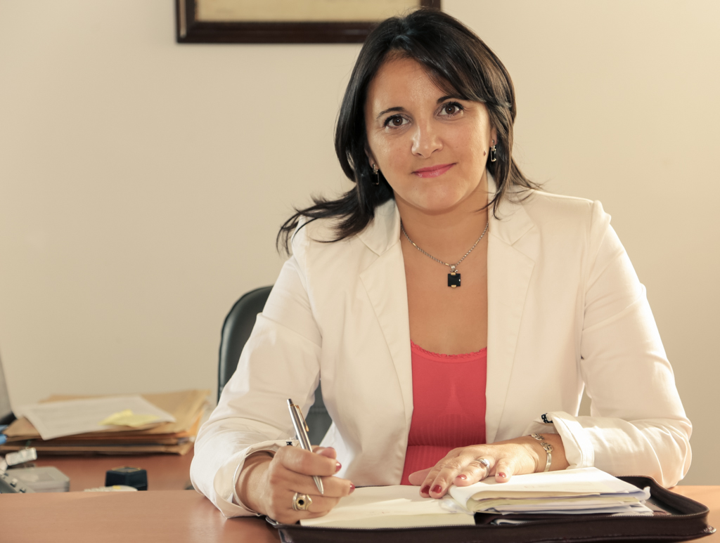 Foto personal para articulo wikipedia sobre Cecilia Eguiluz